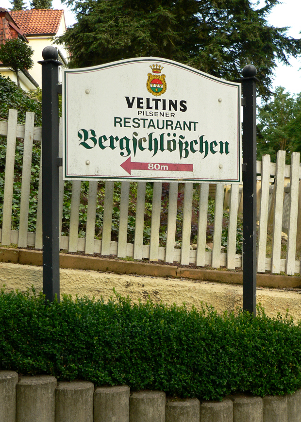 Hinweisschild zum Bergschlößchen in Münden